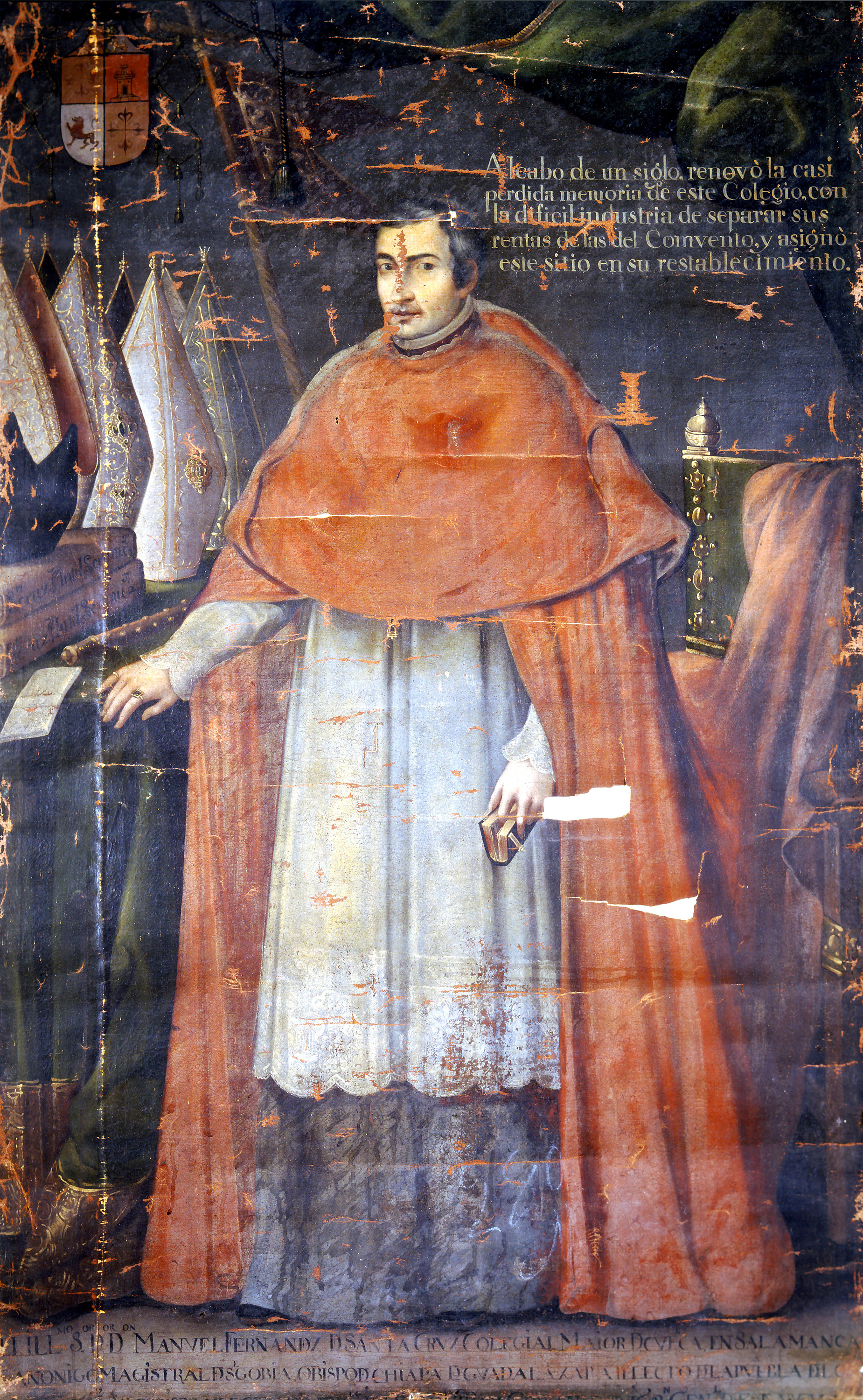 El 12° Obispo de Puebla Manuel Fernández de Santa Cruz (1637-1699)